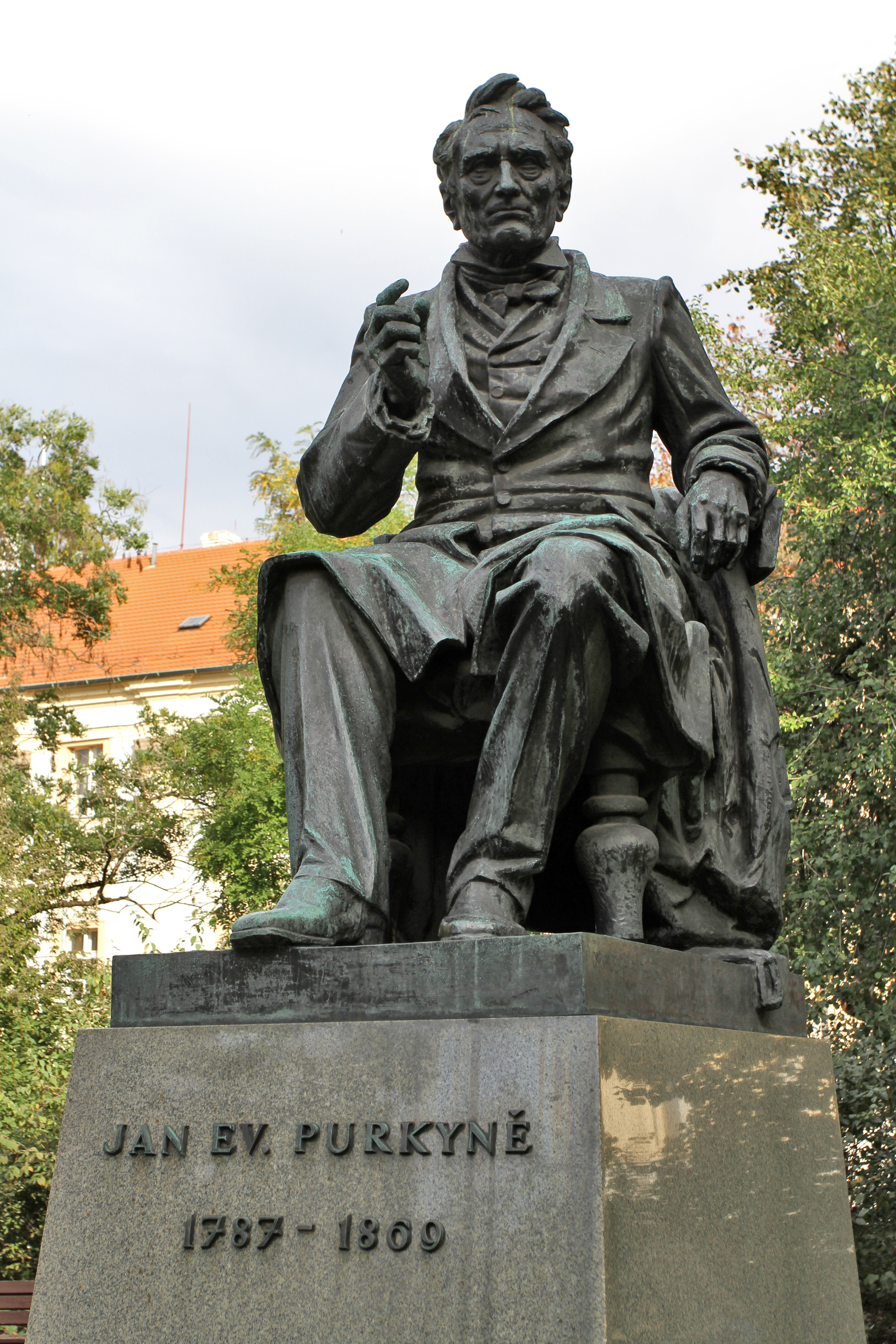 Pomník J. E. Purkyně (Nové Město), Praha 2, Karlovo nám., Nové Město